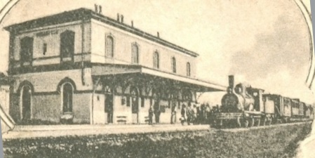 Stazione Mirandola-Bologna (crop)